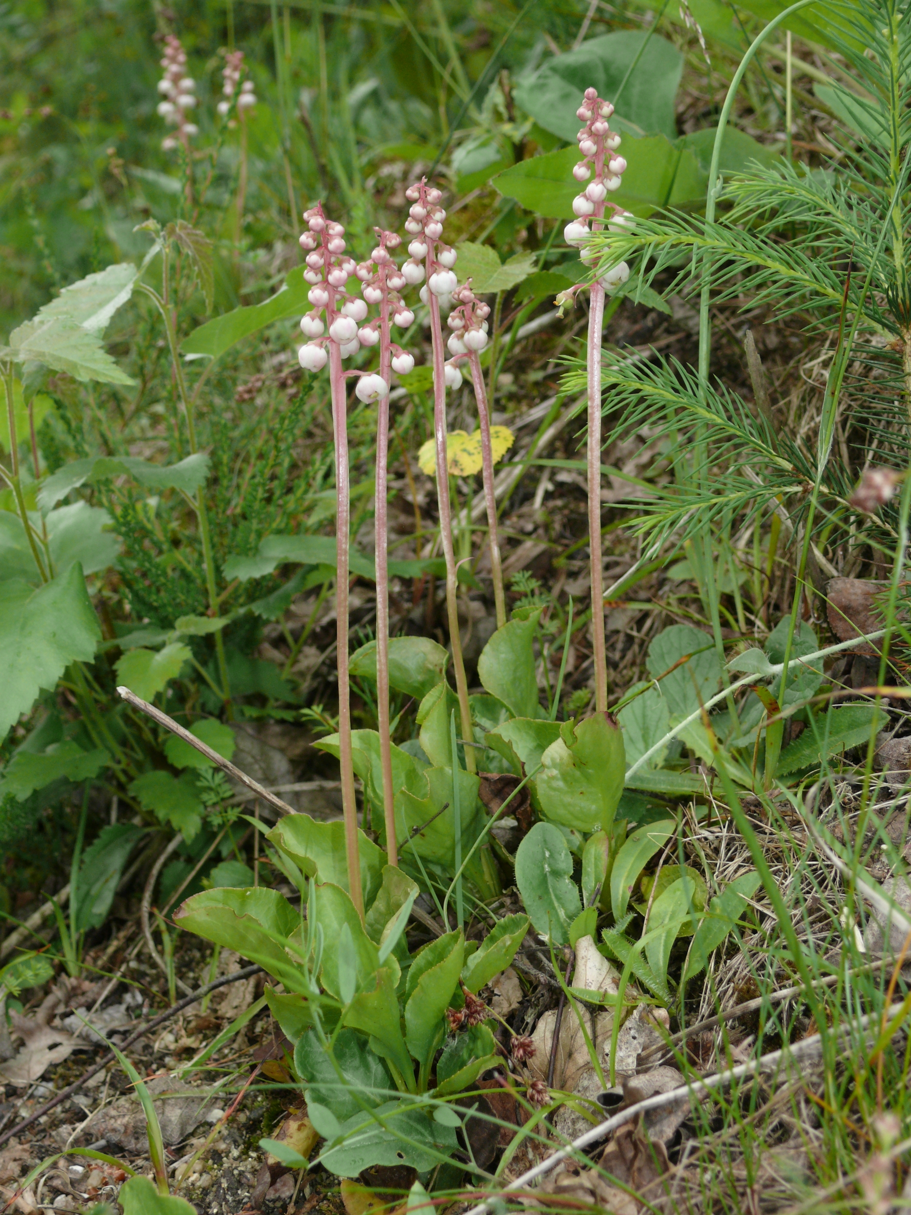 Pyrola minor, Virngrund